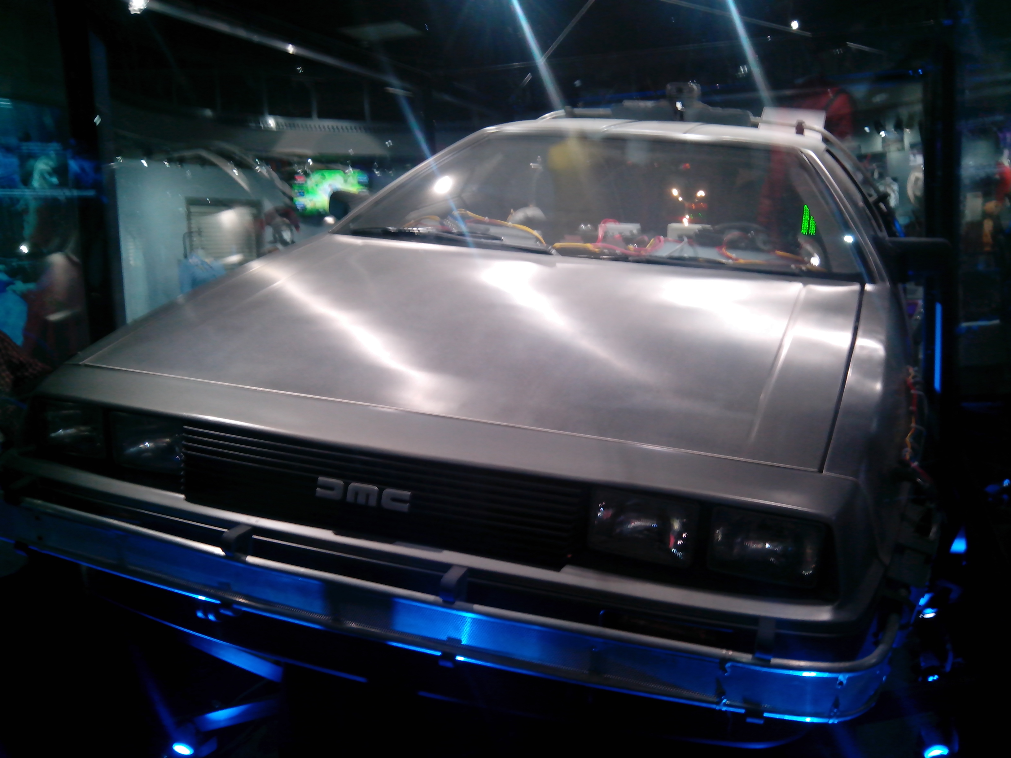 DeLorean de la película Regreso al futuro, en Universal Studios Hollywood.